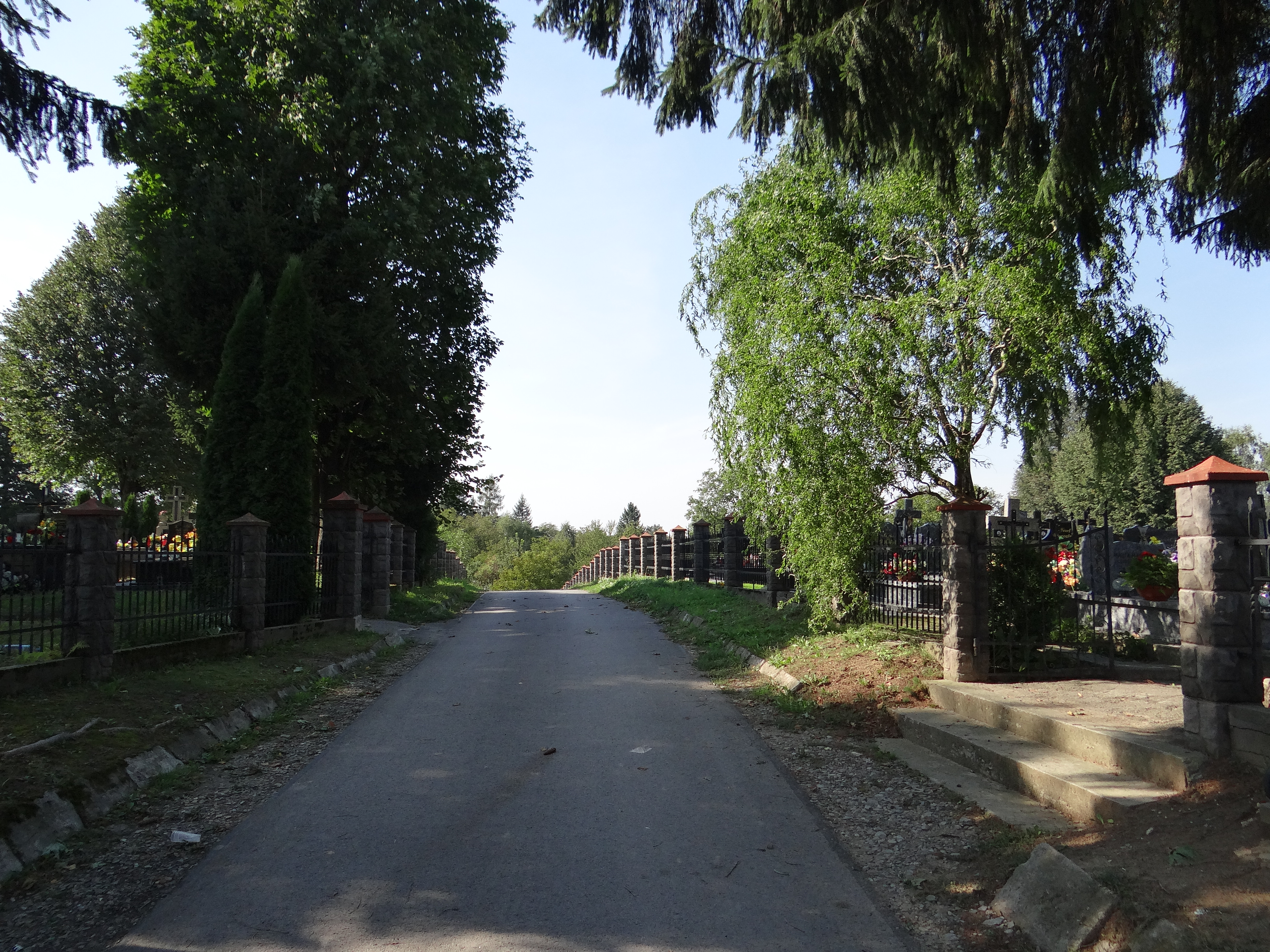 Nowosielce, cmentarz rzym.-kat. (2 części rozdzielone drogą), poł. XIX